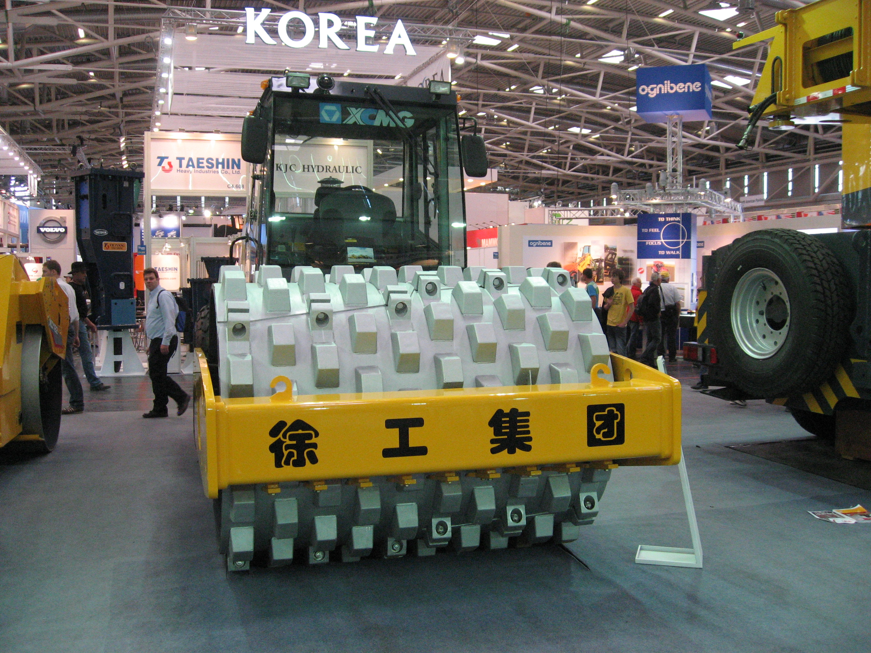 Walze XCMG aufgenommen auf bauma 2010 in München